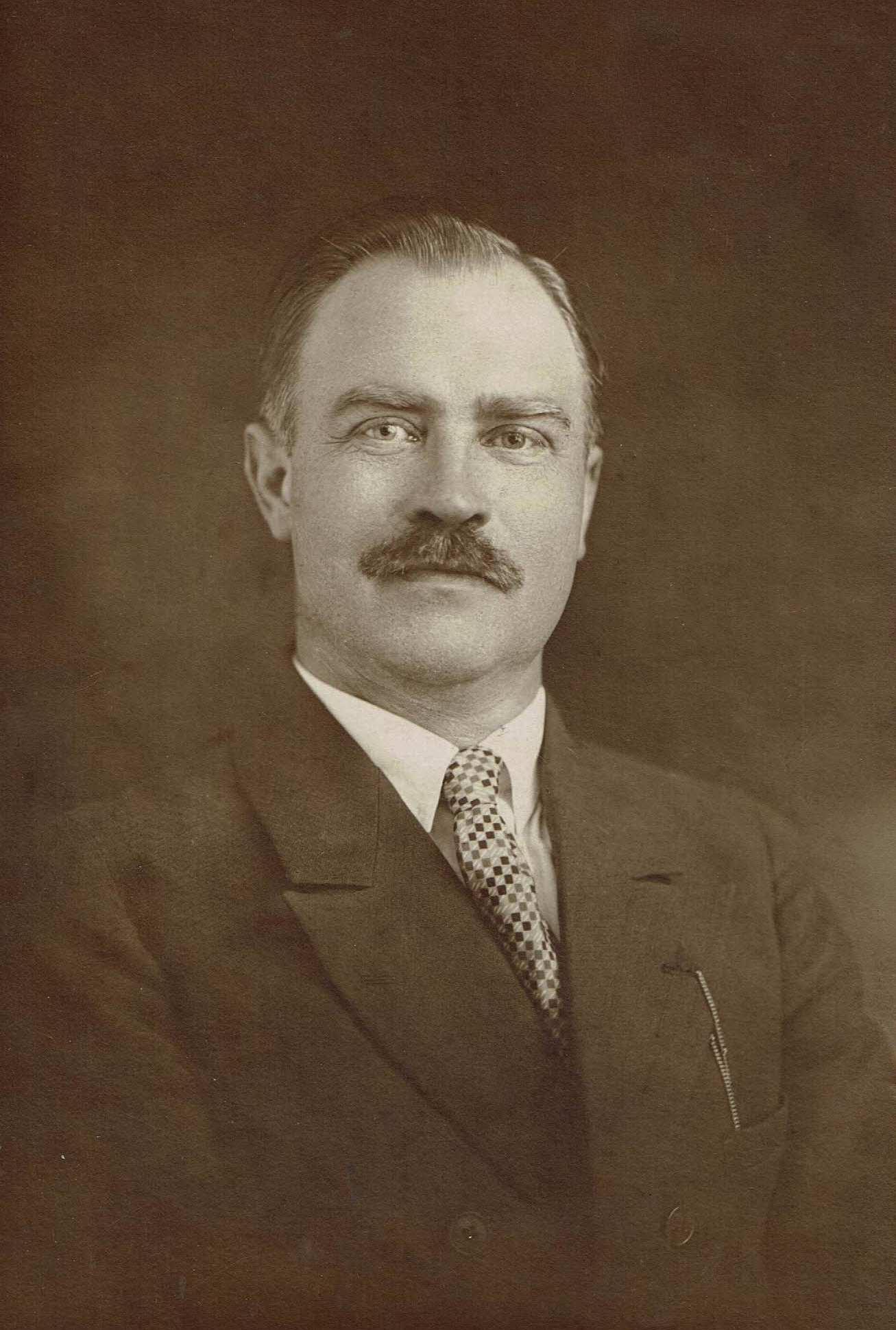 Portretfoto van Chris van Abkoude uit 1925 te New York, USA